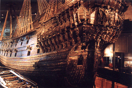 Das schwedische Linienschiff „Vasa“, 1628 bei der Jungfernfahrt im Hafen von Stockholm gesunken, 1961 gehoben, in seinem Museum in Stockholm. Gut zu erkennen ist das sehr gut erhaltene reich geschmückte Heck.